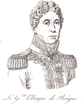 Gravure de l'artiste Boilly représentant le portrait du Comte Benoît de Boigne réalisé en 1823.